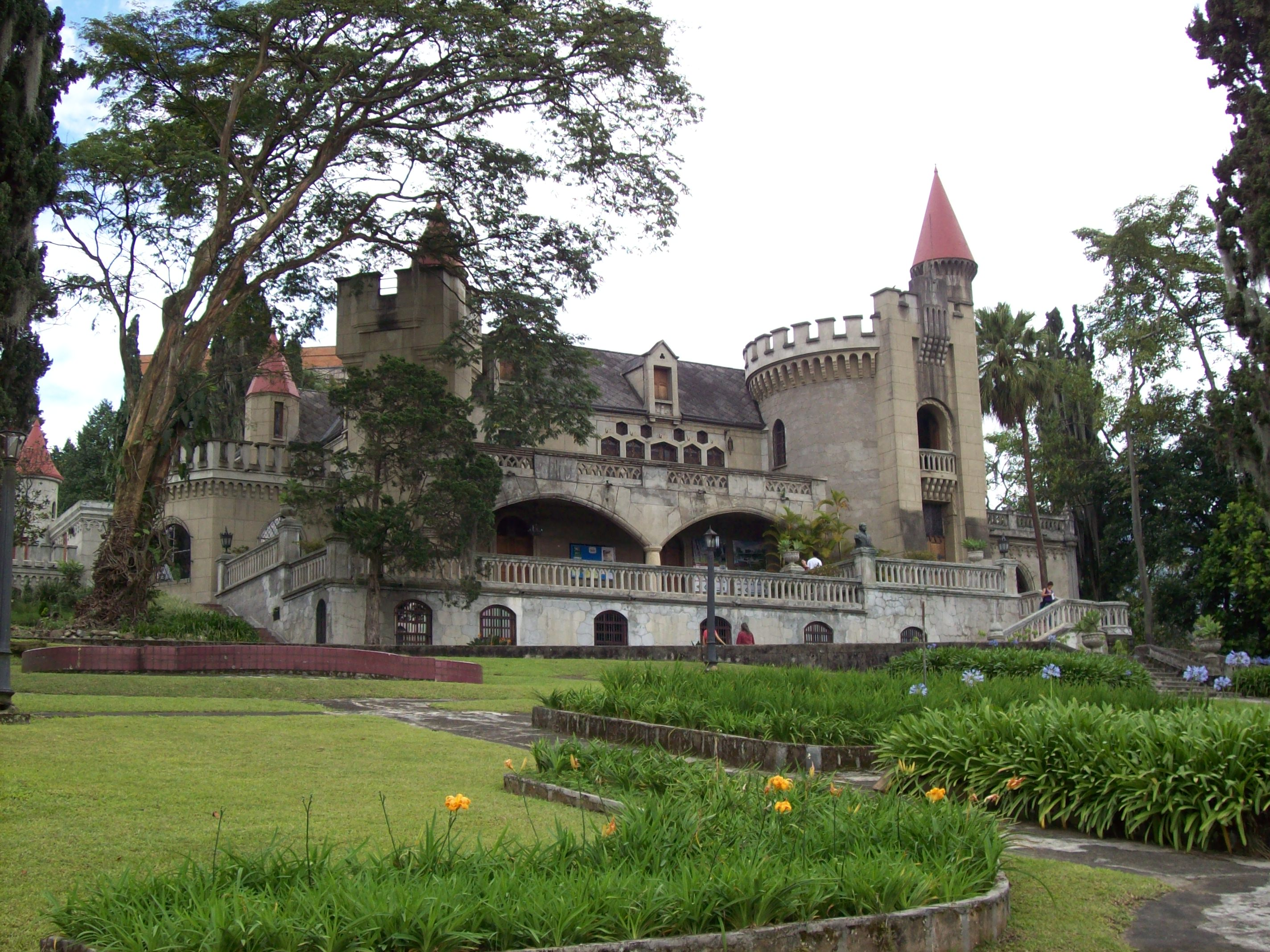 Vista exterior del Museo El Castillo.